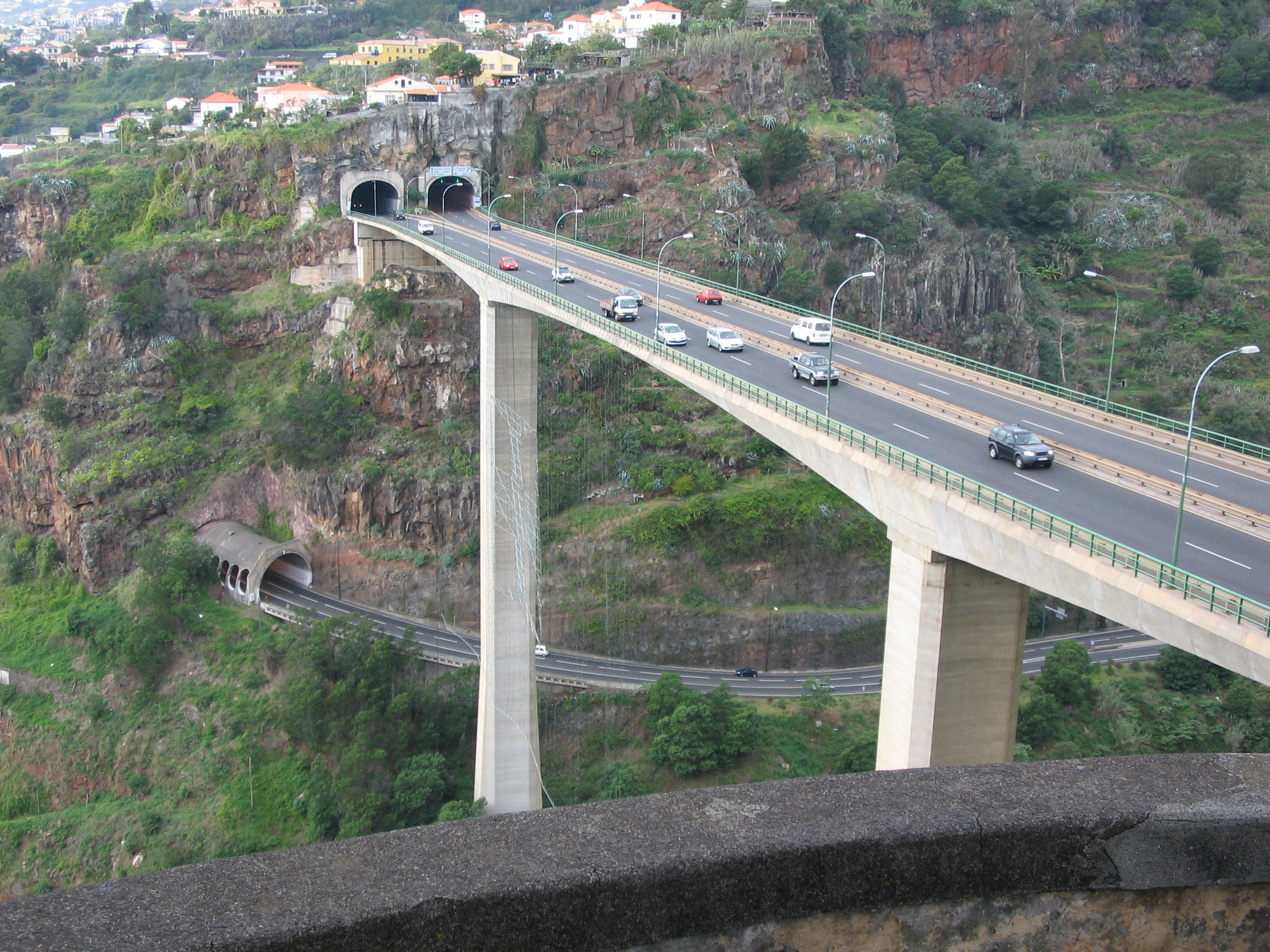 Az ER 101 út São Gonçalo felől Funchalba bevezető szakasza a Botanikus Kert felől nézve, Madeira